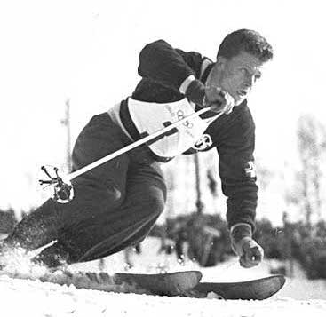 STEIN ERIKSEN: Vant storslalån i Oslo i 1952